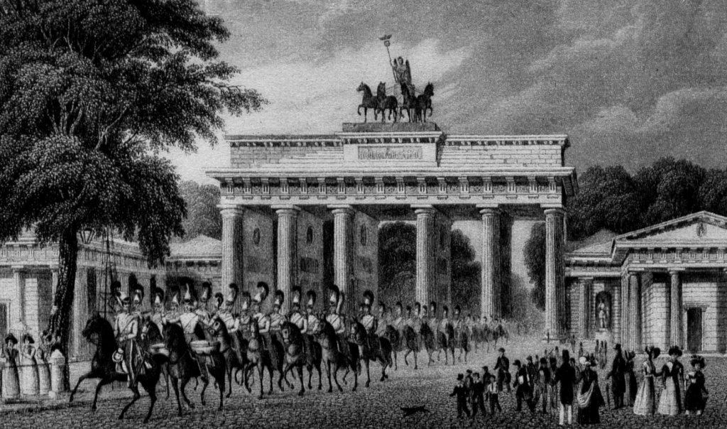 Brandenburger Tor in Berlin, 1832 Stich, digital überarbeitet von Benutzer:NicolasFS